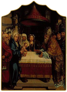 O retábulo "do Paraíso", assim designado uma vez que provém do altar-mor do extinto Convento do Paraíso em Lisboa, foi já objecto de alguns estudos que resultaram em opiniões diversas e divergentes no que toca à sua autoria. Num primeiro momento, o conjunto foi atribuído a Grão Vasco (Vasco Fernandes), por Taborda e Cirilo, opinião refutada por Raczynski que propôs o nome de Abram Prim (Primus). Carl Justi apontou como autor o pintor Velascus e Émile Bartaux dividiu a série em dois conjuntos, atribuindo a "Anunciação", a "Visitação" e a "Natividade" a Cristóvão de Figueiredo, e os restantes painéis ao "Mestre do Retábulo de Santiago". Foi, porém, José de Figueiredo quem reagropou novamente as oito pinturas e as enquadrou na obra do "Mestre do Paraíso", no que foi secundado por Reinaldo dos Santos. A Myron Malkiel-Jirmounsky, coube alertar para o facto de estarmos na presença de uma obra colectiva e não de um só pintor. Actualmente, e na esteira deste último historiador, ainda que se destaque o nome de Gregório Lopes na atribuição deste conjunto retabular, não há dúvida em se afirmar que se trata de uma obra de parceria, o que é desde logo visível na heterogeneidade pictórica e técnica das várias tábuas que o compõem.